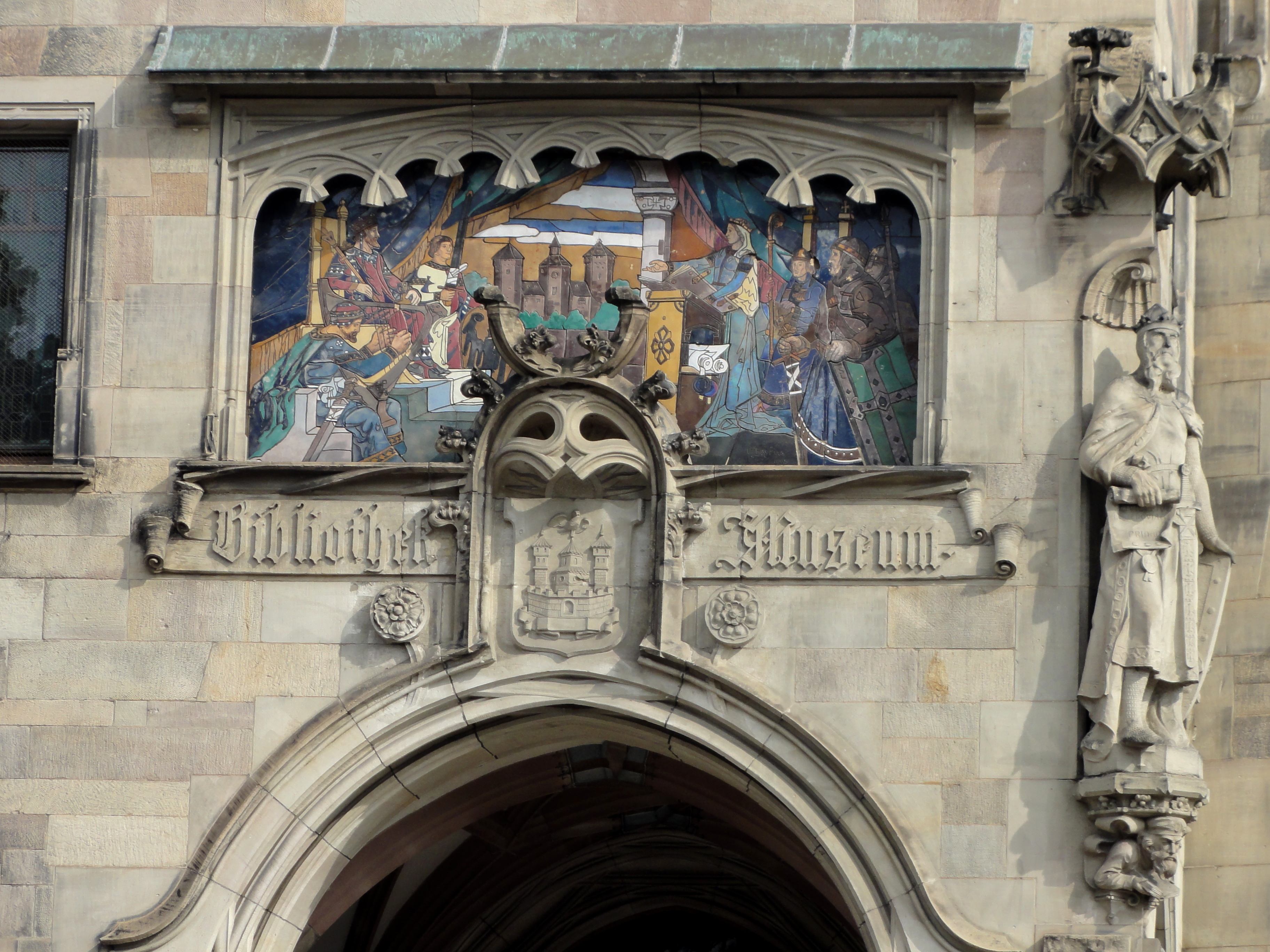 Alsace, Bas-Rhin, Haguenau, Musée historique (1901-1904), 9 rue du Maréchal Foch (IA00061933).